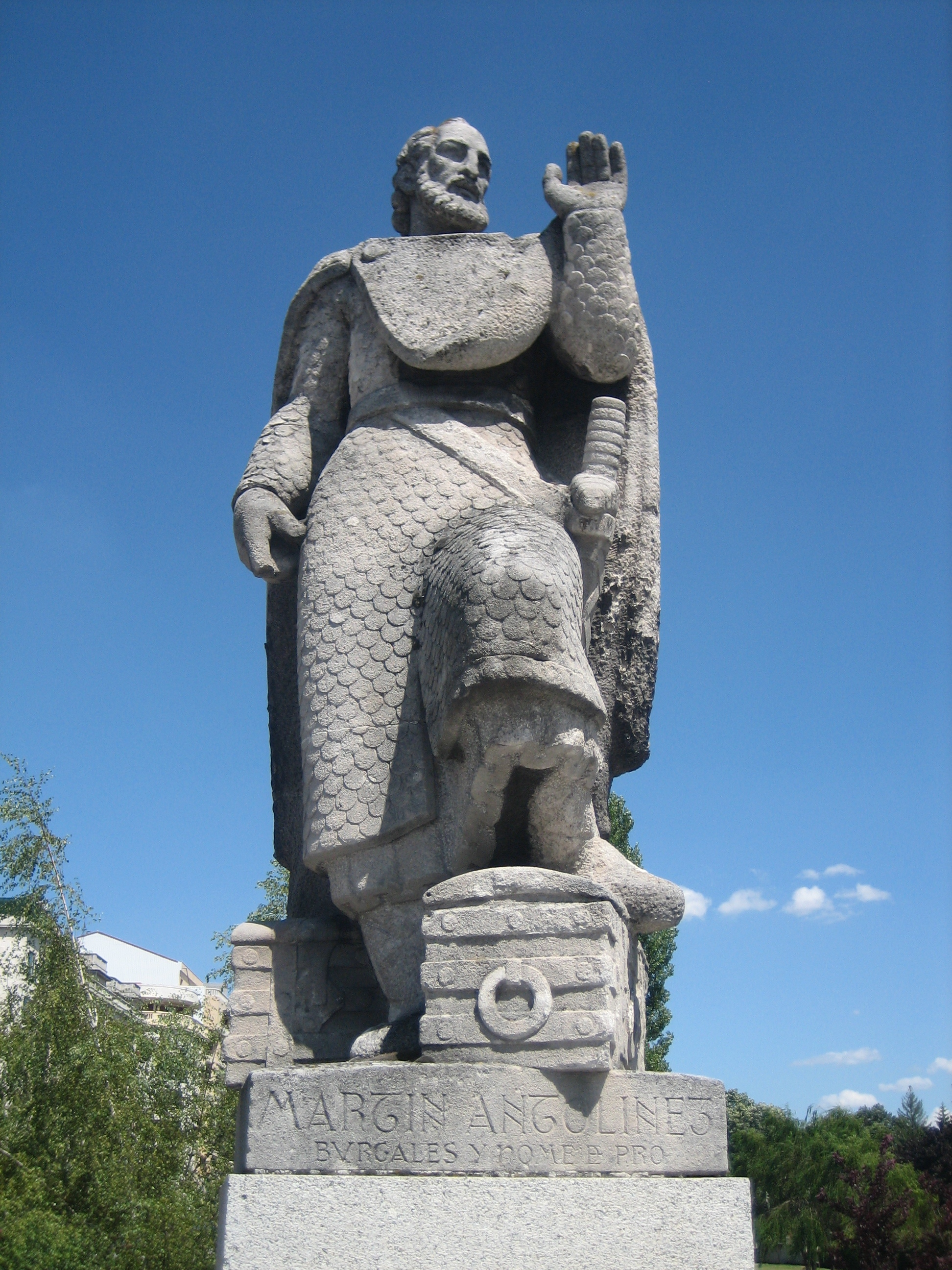 Estatua de Martín Antolínez obra de Joaquín Lucarini